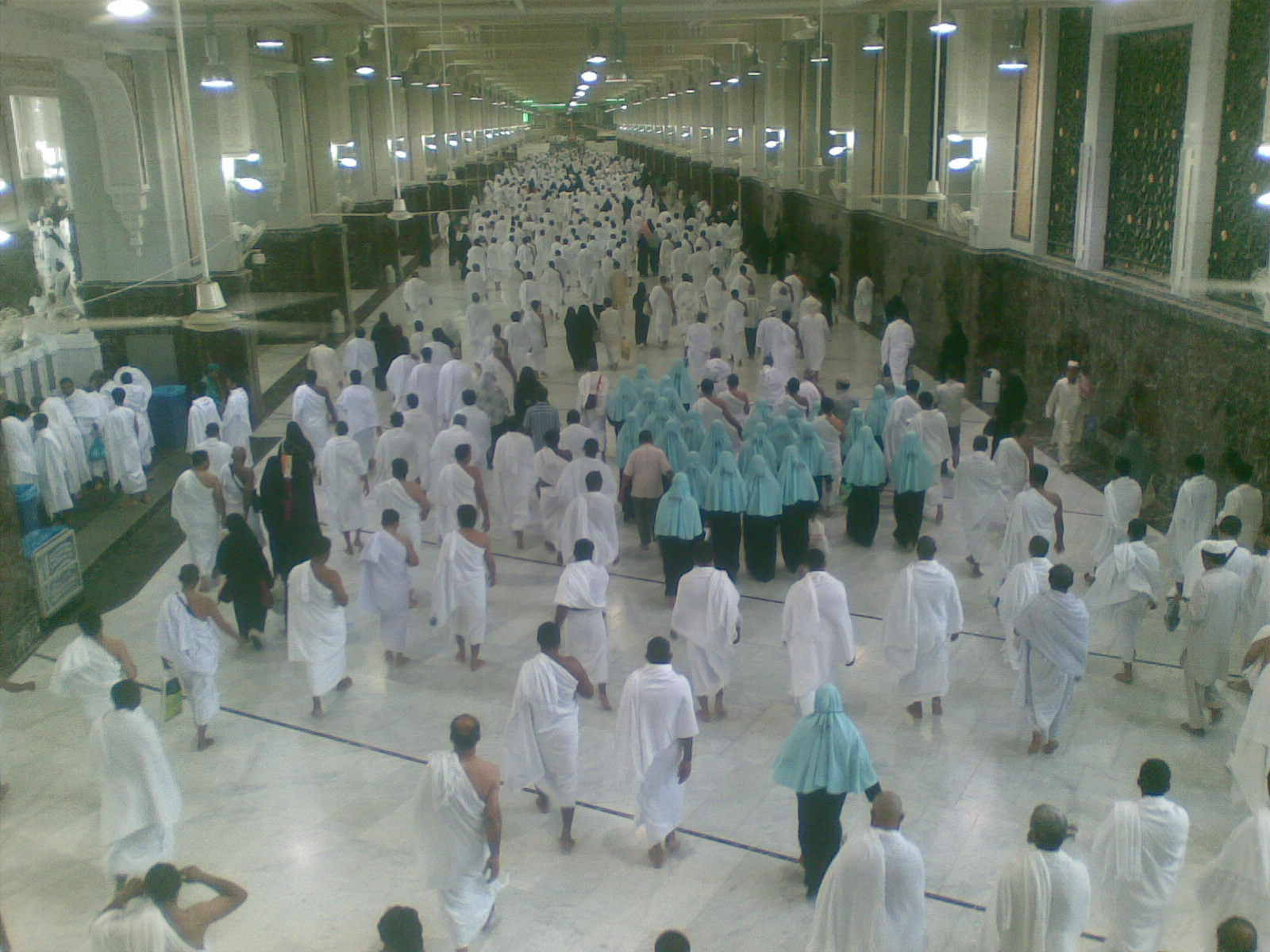 സഫ-മര്‍വ കുന്നുകള്‍ക്കിടയിലൂടെയുള്ള നടത്തം